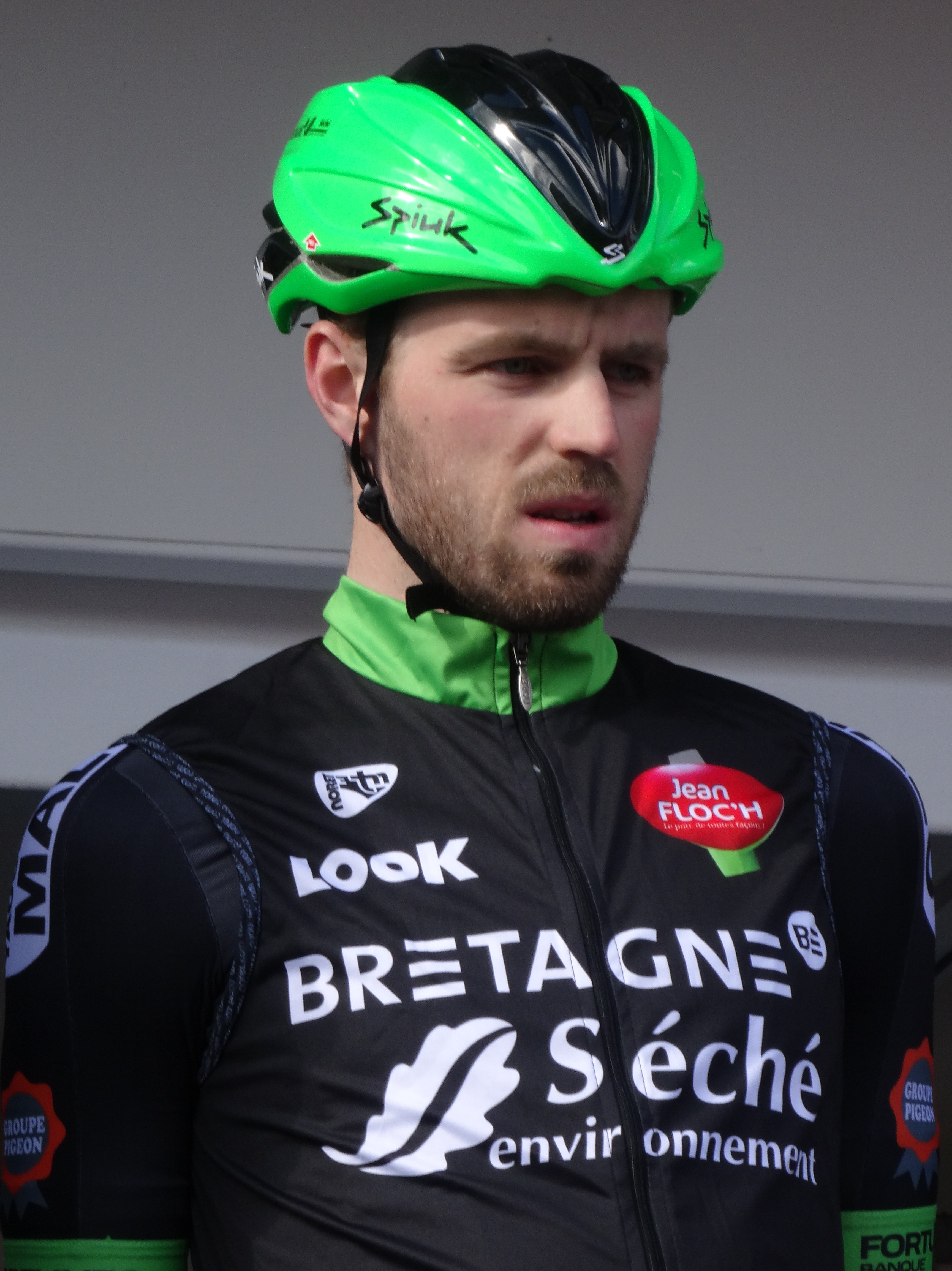 Reportage réalisé le mercredi 4 mars à l'occasion du départ du Samyn des Dames 2015 et du Samyn 2015 à Quaregnon, Belgique.